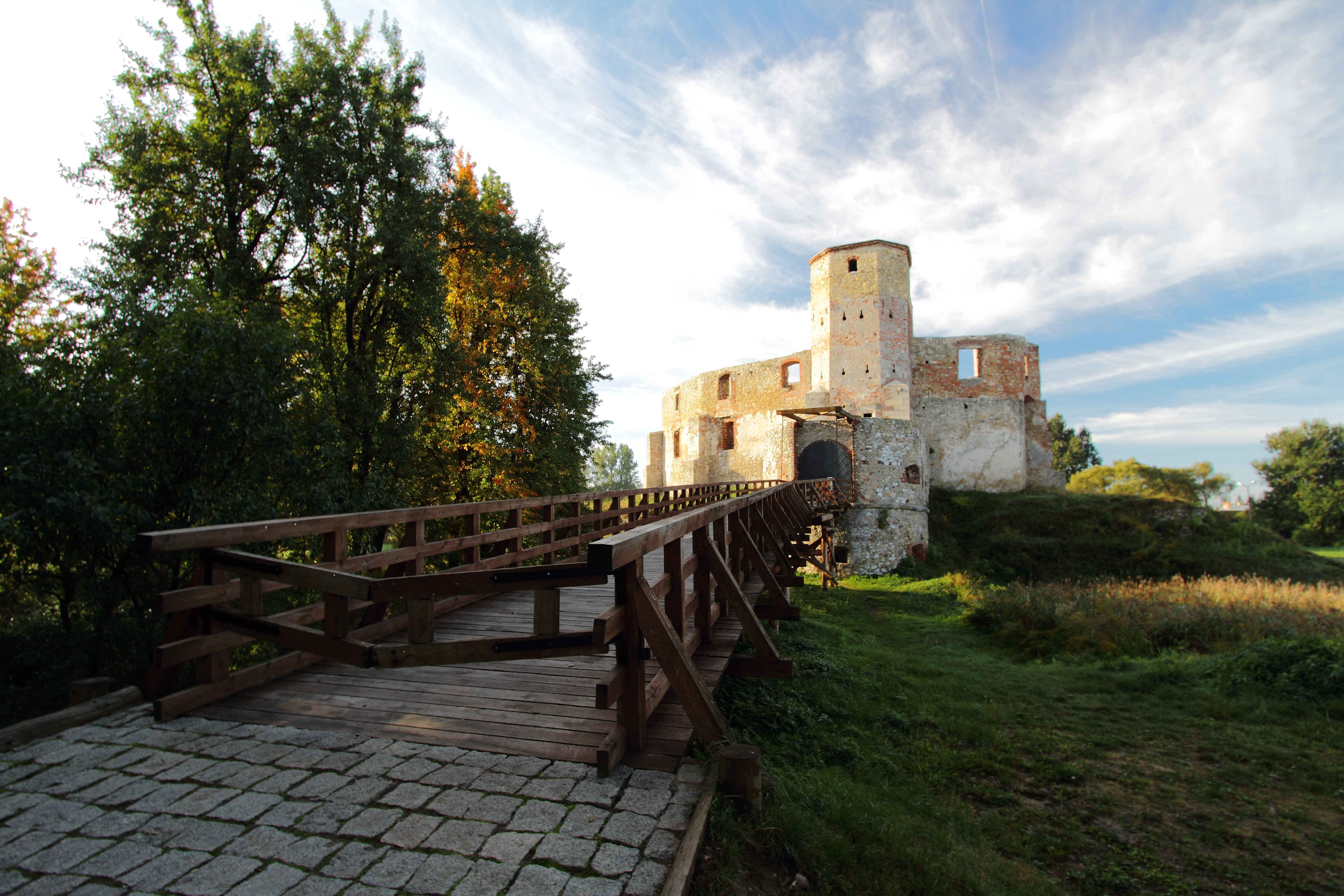 Ruiny z XIVw.